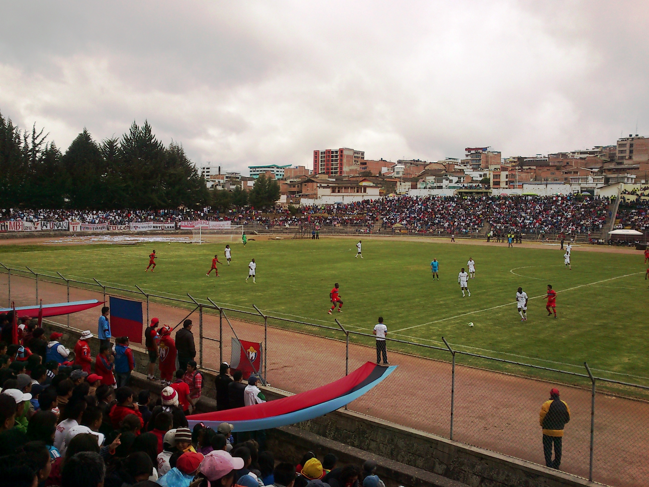 Estadio Olímpico de Tulcán durante partido amistoso entre Liga de Quito y Club Deportivo El Nacional